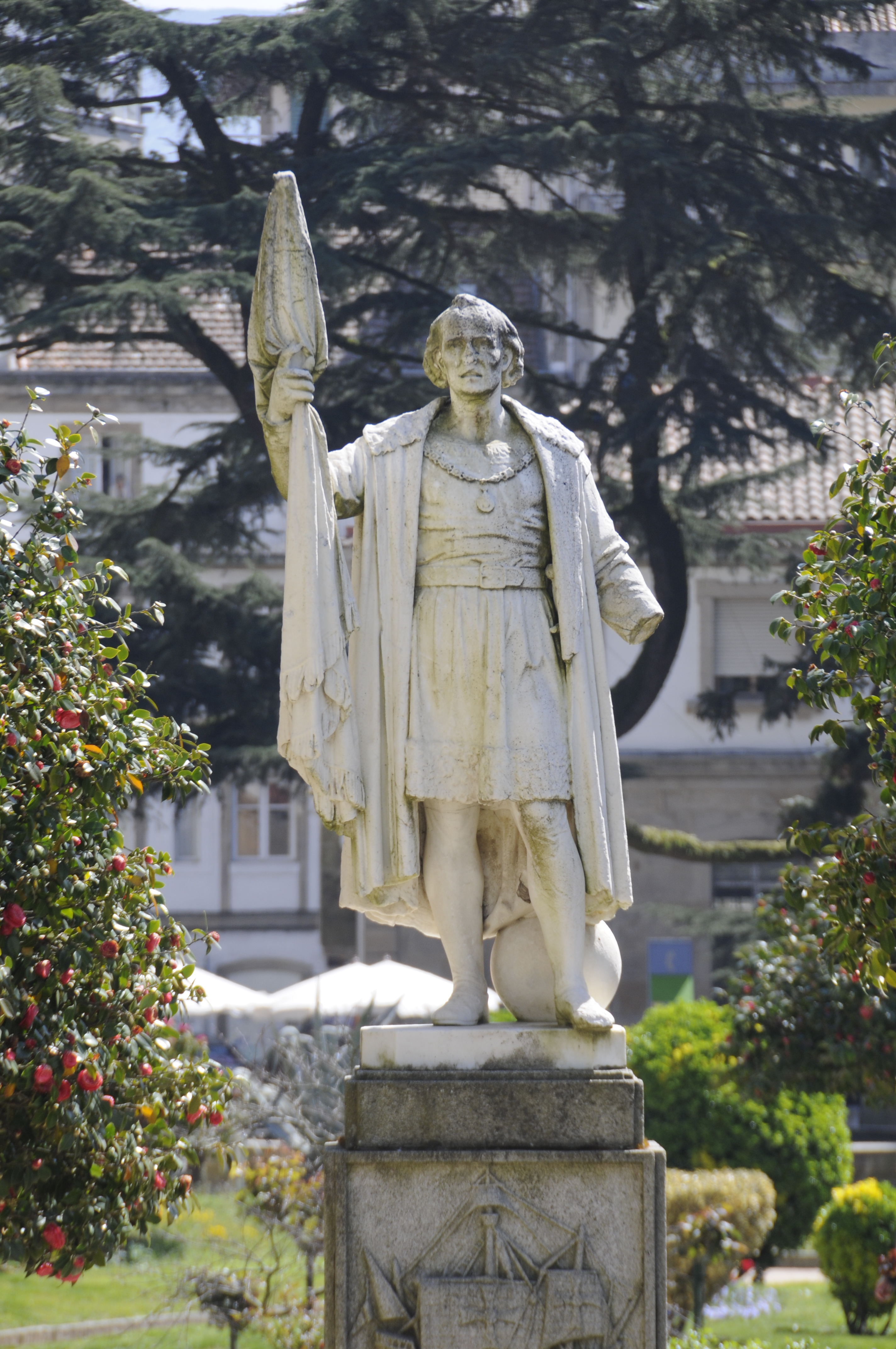 estatua de marmol de finales del siglo XIX realizada por Juan San Martin y Senrra.